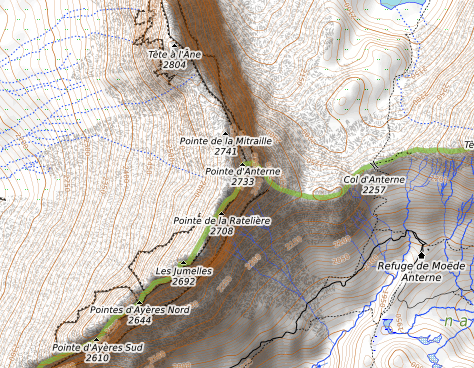 carte réalisée sur umap This map may be incomplete, and may contain errors. Don't rely solely on it for navigation.